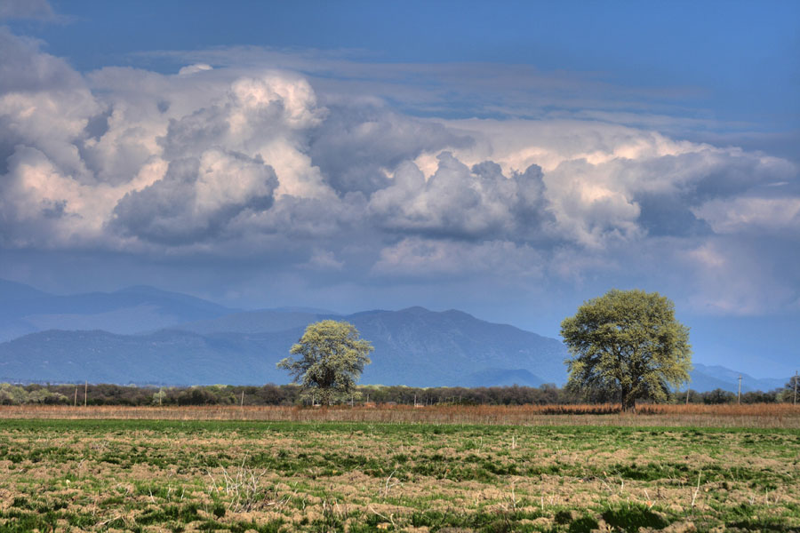 Alazani Valley